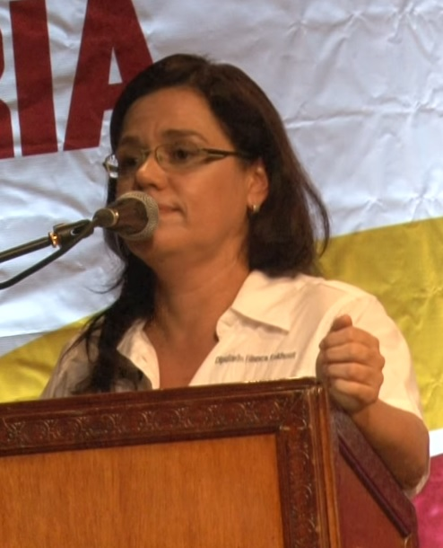 Blanca Eekhout, 08/11/2016